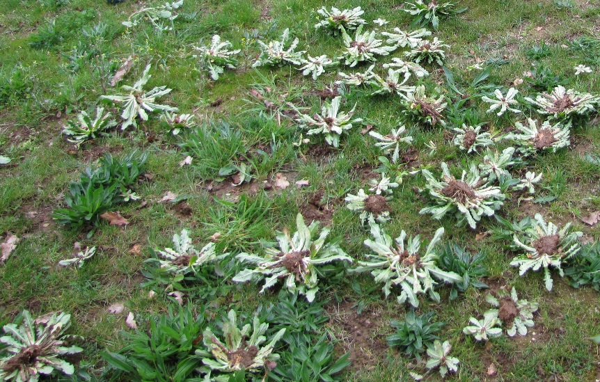 Groins d'âne retournés